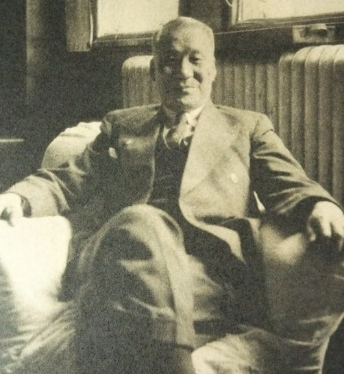 平塚常次郎